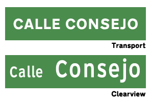 Comparación del rótulo de una calle escrito en tipo Clearview con Transport.